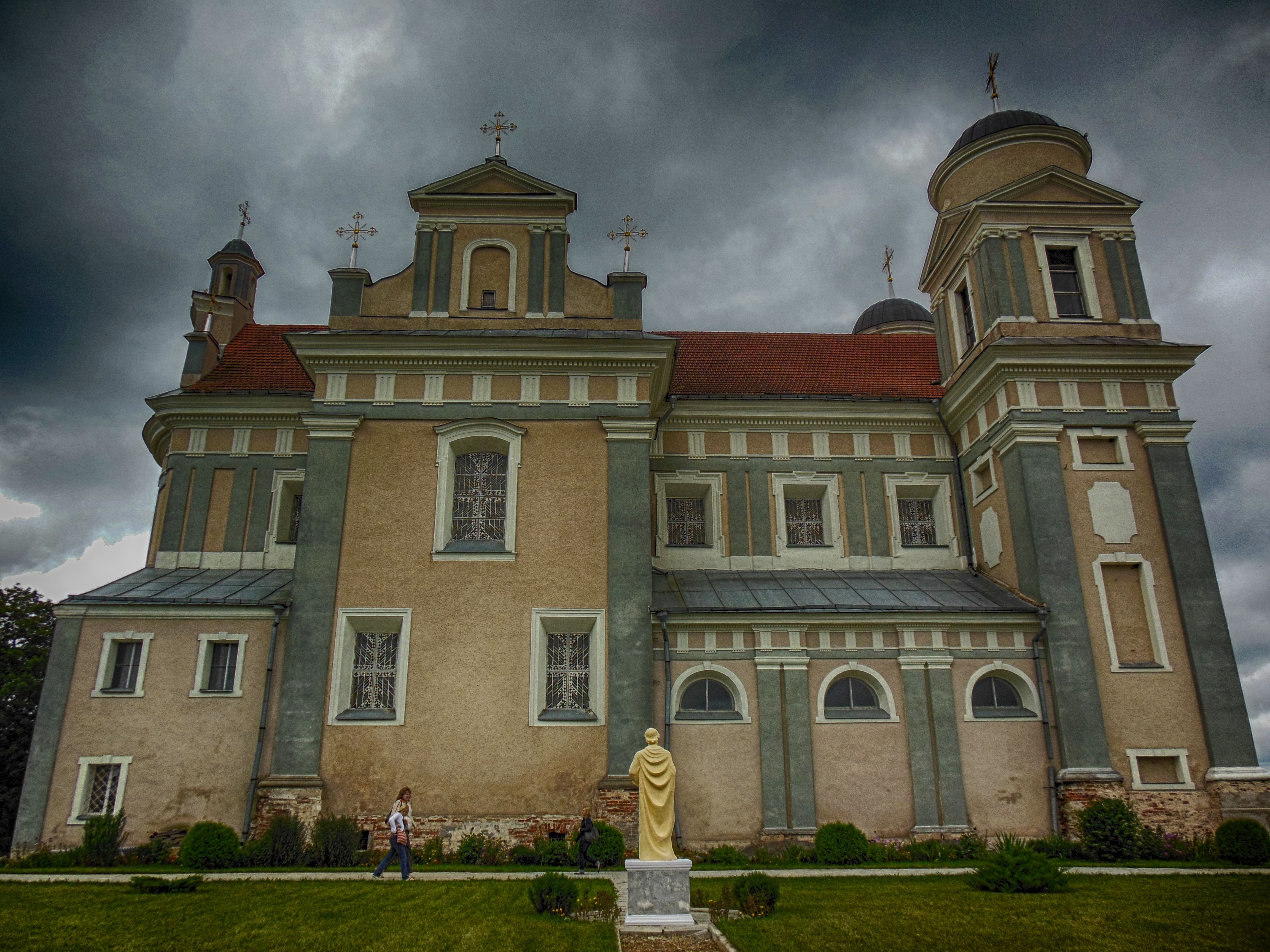 Беларуская (тарашкевіца): Касьцёл Сьвятога Тадэвуша, росьпісы інтэр’ера. в. Лучай This is a photo of Belarusian heritage monument. Reference number: 212Г000596 ( WLM)